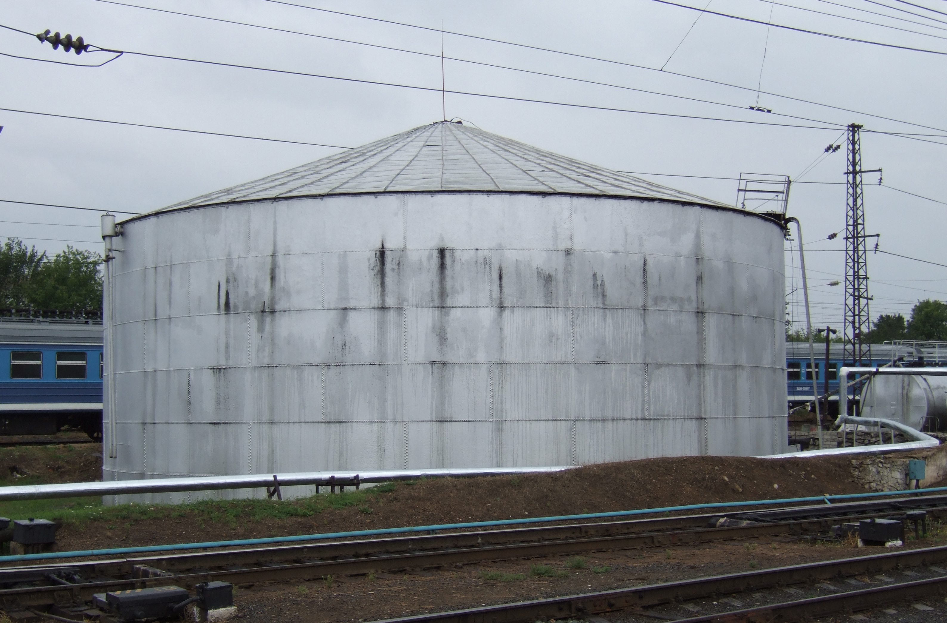 Steel_Oil_depot_by_Vladimir_Shukhov